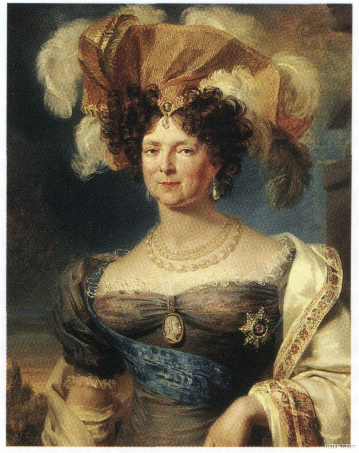 Изображена с орденом Святого Андрея Первозванного (лента и звезда).